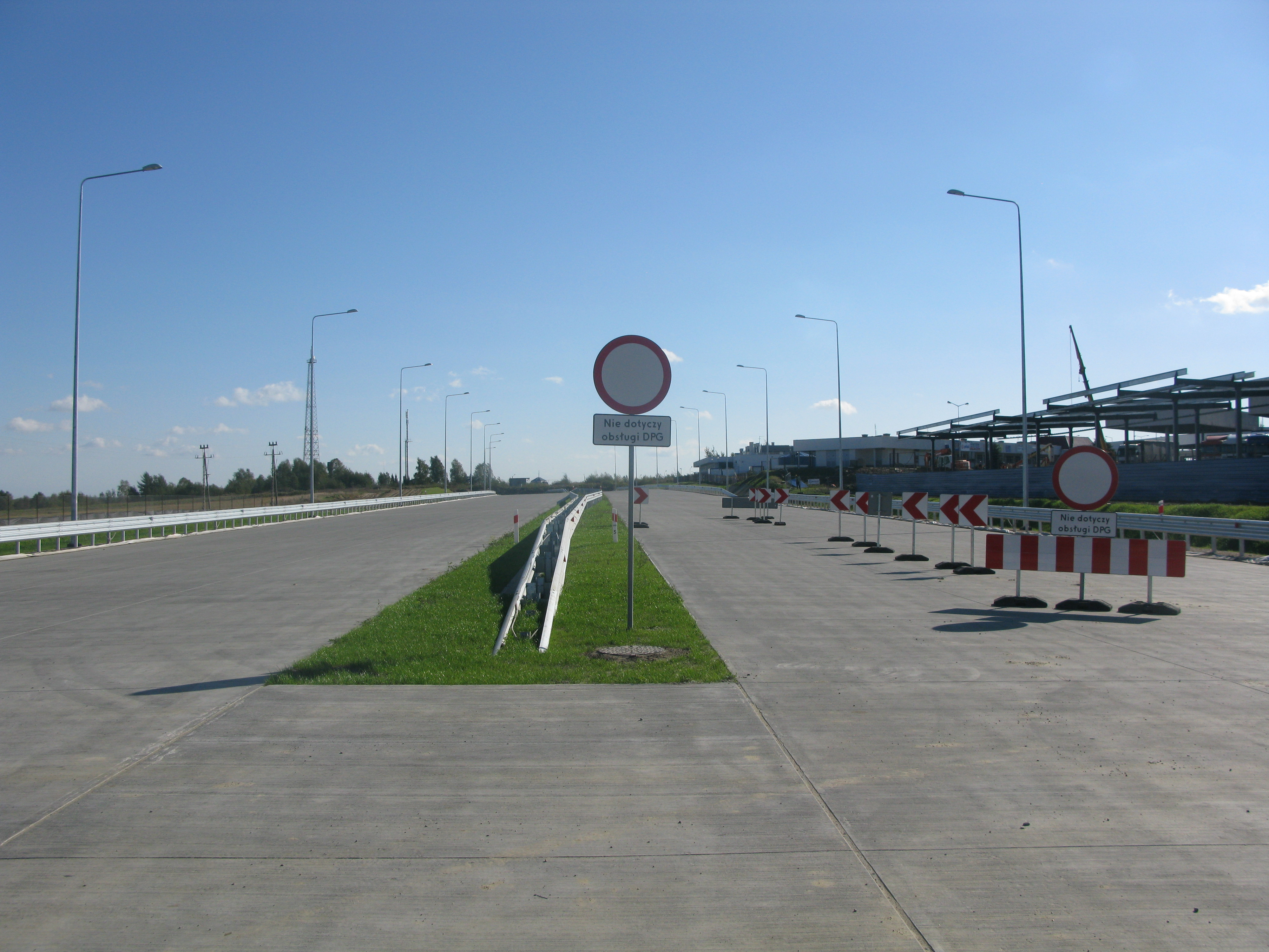 2012 noch nicht angeschlossen Teil der Autostrada A4 Przemyśl – Korczowa. Die Freigabe für den Verkehr erfolgte im Dezember 2013.